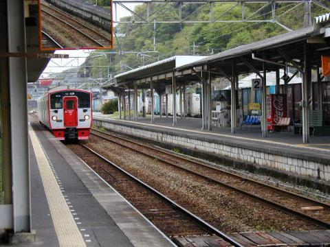 臼杵駅 投稿者撮影